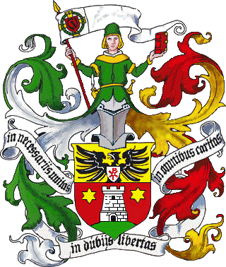 Coat of arms of the Cartellverband der katholischen deutschen Studentenverbindungen.